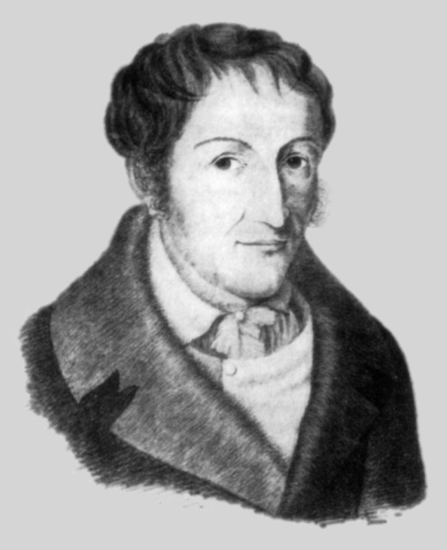 Christian Zais, 1770-1820, klassizistischer Architekt und Städtebauer